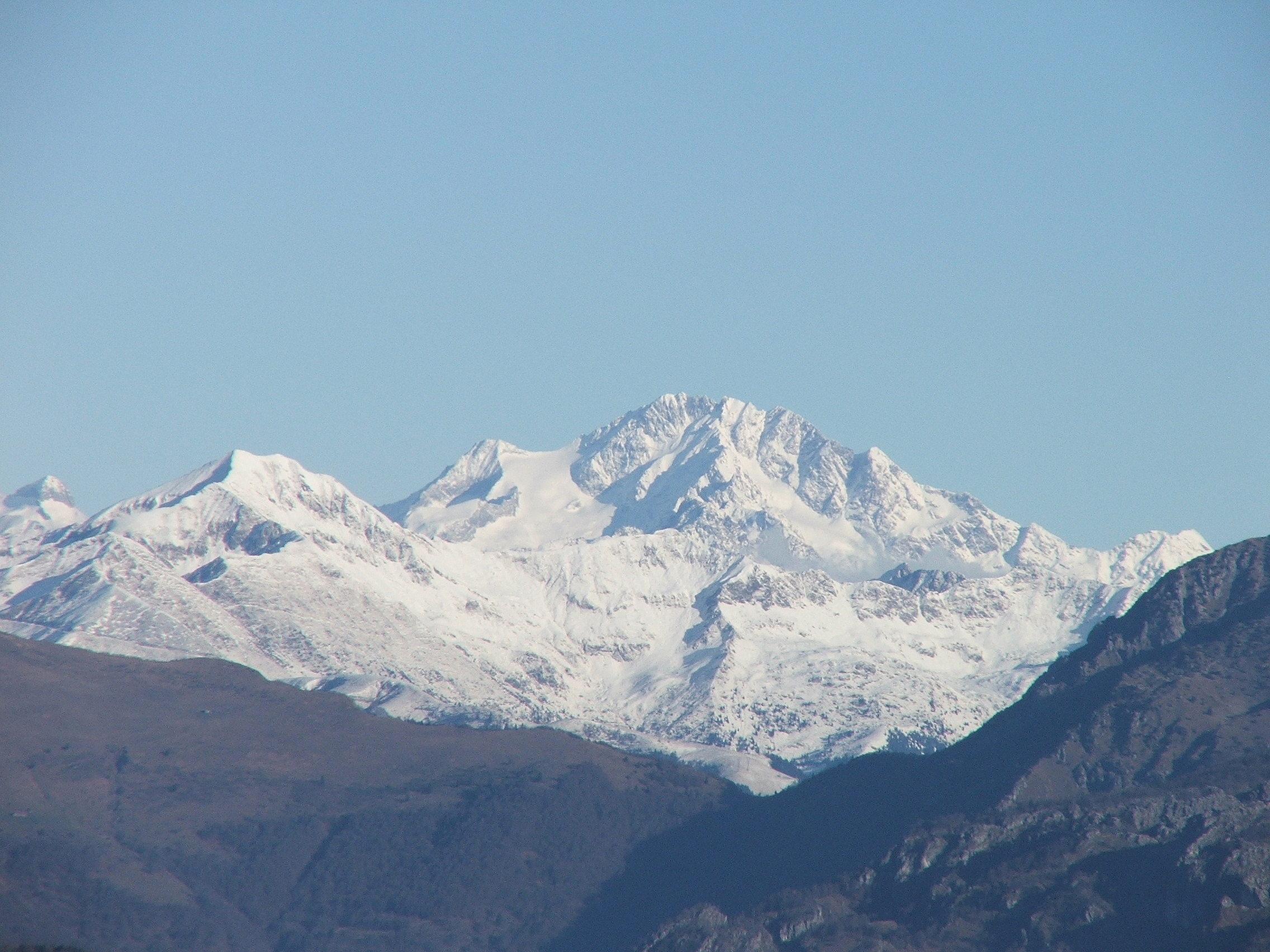 fatta da me